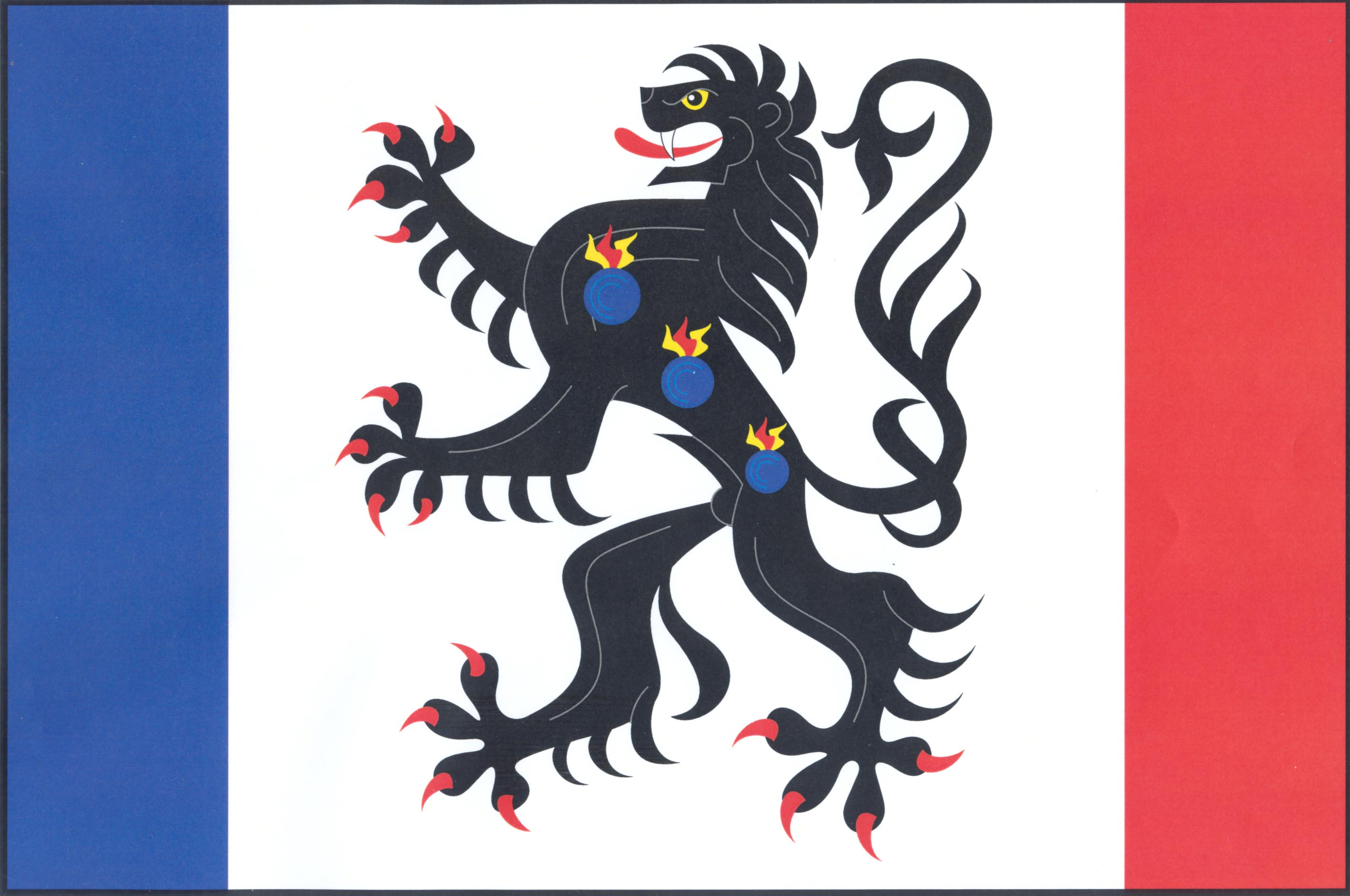 vlajka obce Bílá Třemešná